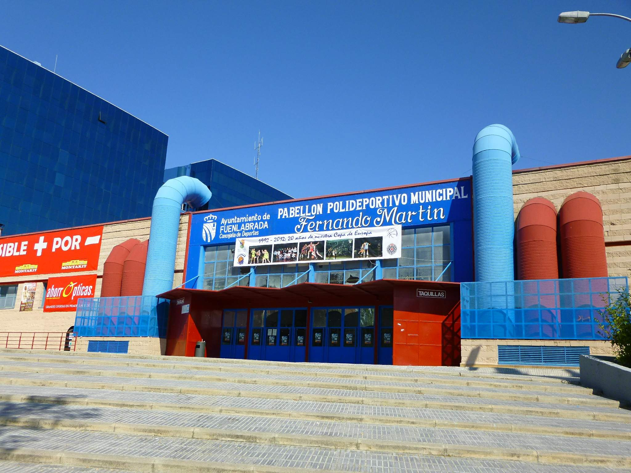 Pabellón Polideportivo Municipal Fernando Martín (Fuenlabrada, Madrid)